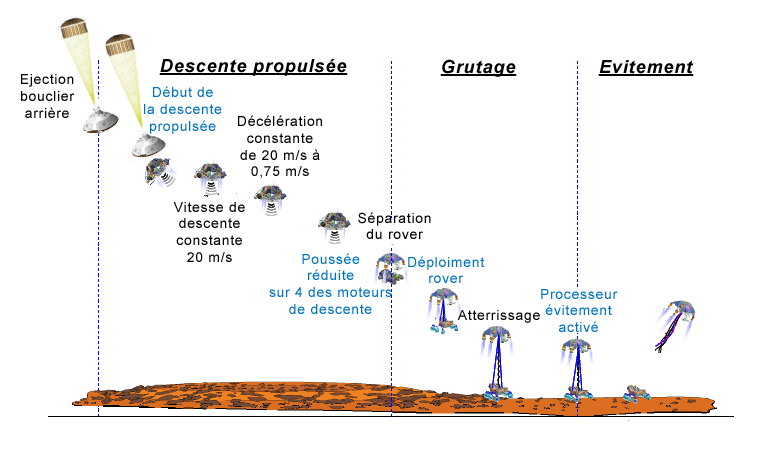 Fin de la descente sur Mars de la sonde Mars Science Laboratory